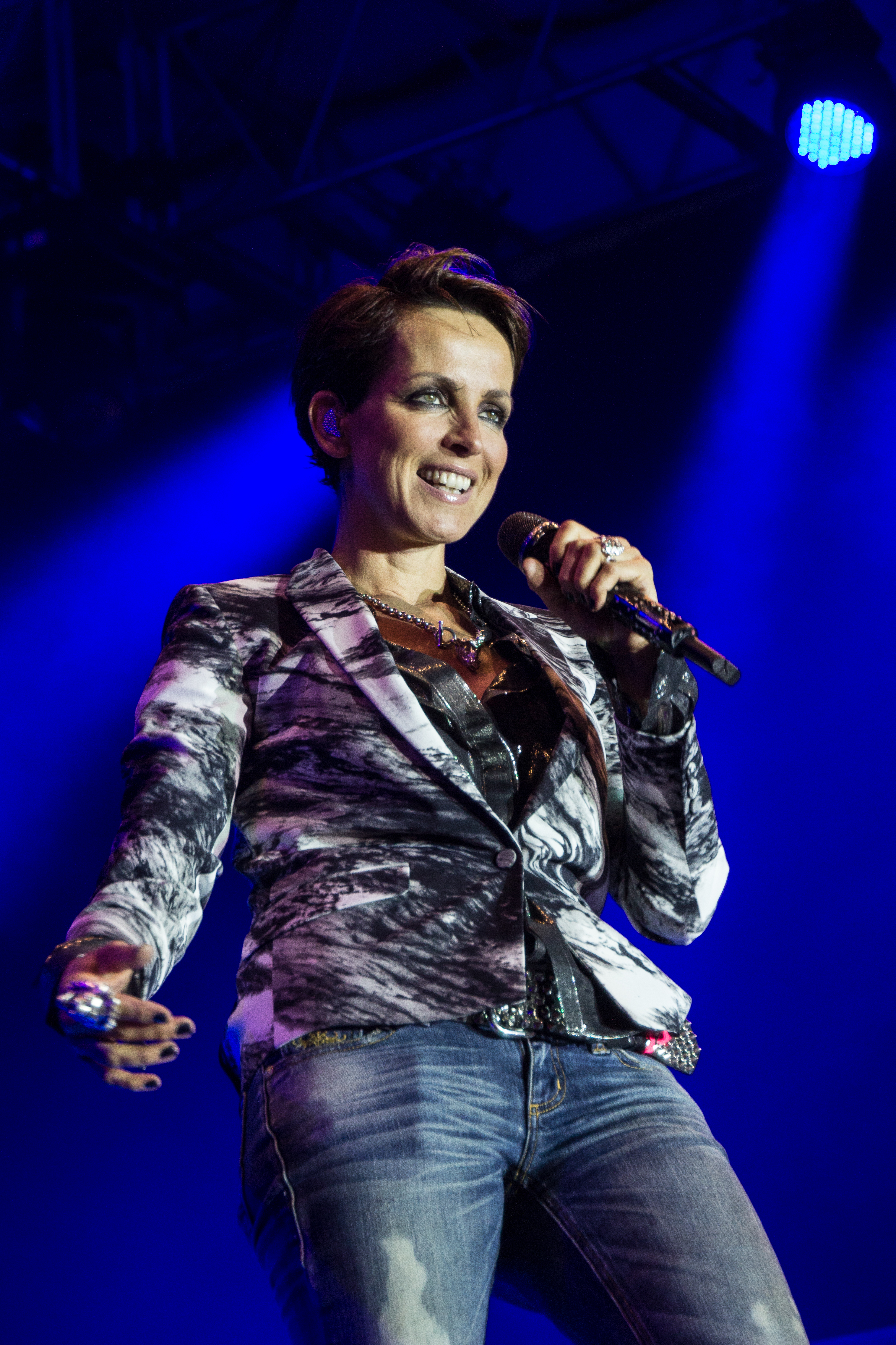 Nena-Auftritt beim 50. Havelfest in Brandenburg an der Havel auf der Stadtwerke Bühne am Heinrich-Heine-Ufer.